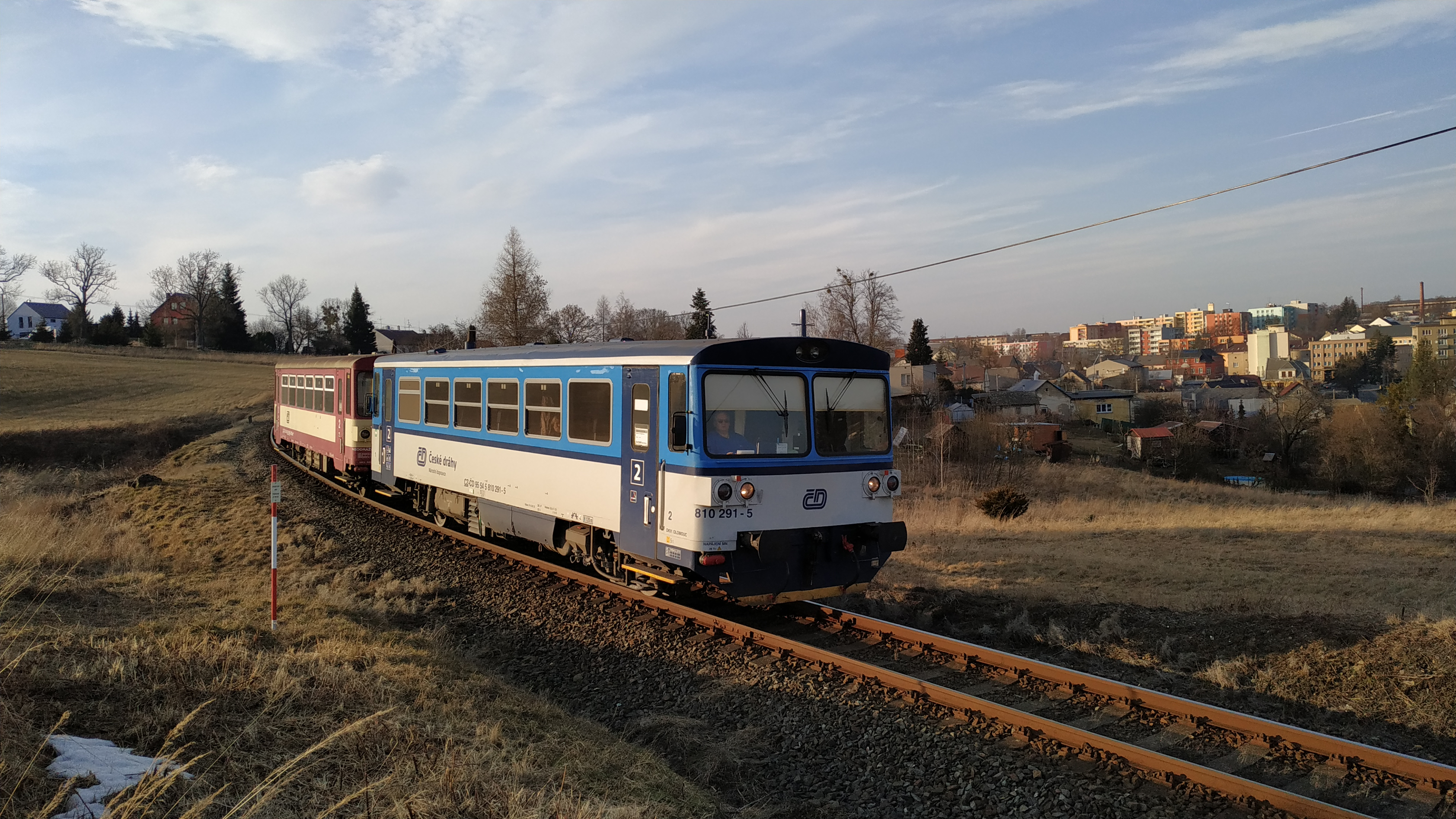 Vůz 810 z Vítkova směrem na Suchdol nad Odrou